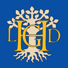 According to the Republic of Lithuania Law on Copyright and Related Rights (passed on May 18, 1999 and amended 2010) Chapter II, Section 1, Article 5, case 3: "Copyright shall not apply to official State symbols and insignia (flags, coat-of-arms, anthems, banknote designs, and other State symbols and insignia) the protection of which is regulated by other legal acts." Hence it is assumed that this image has been released into the public domain. However, in some instances the use of this image might be regulated by other laws.